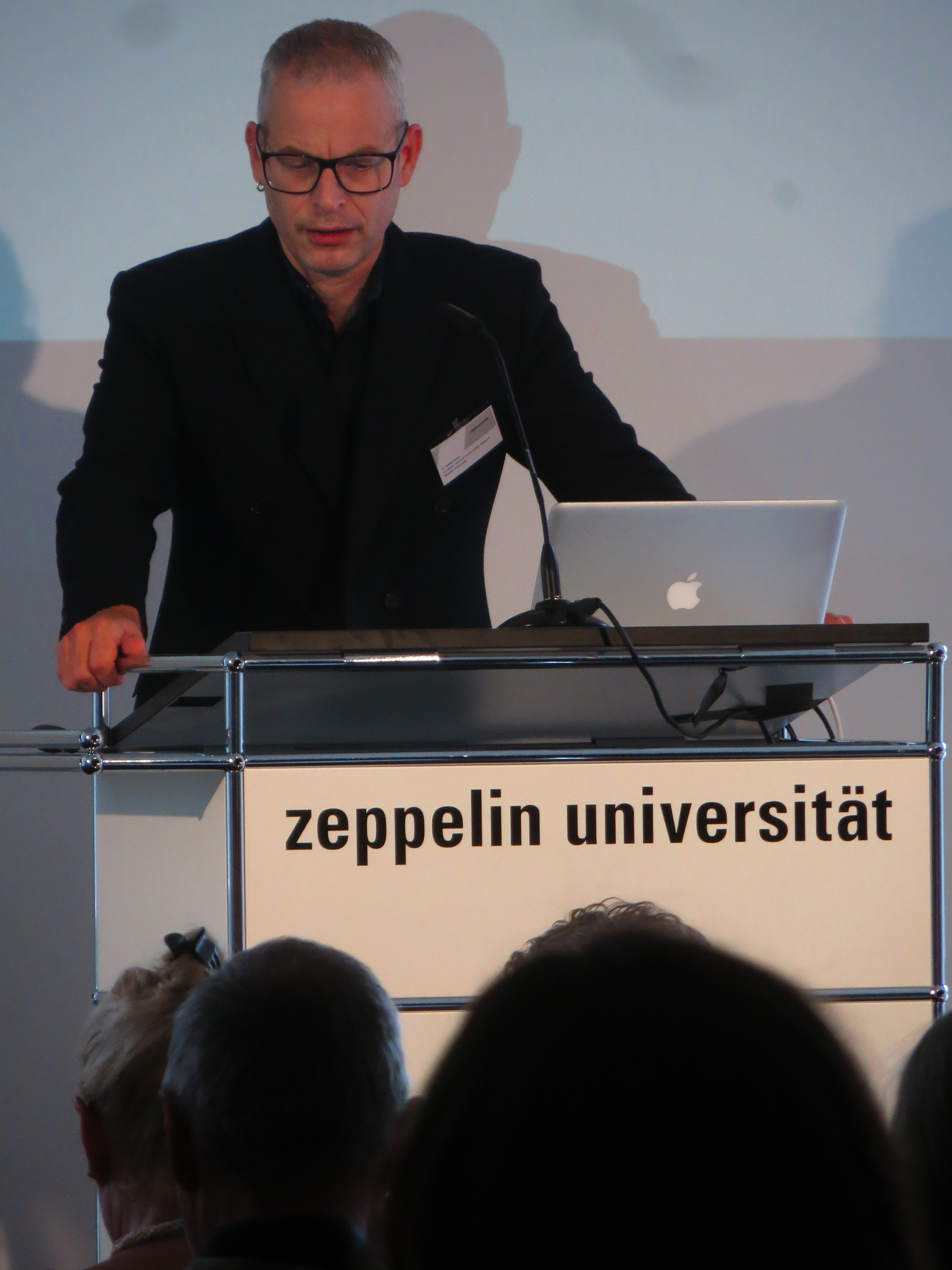 ECS-Jahrestagung 2017